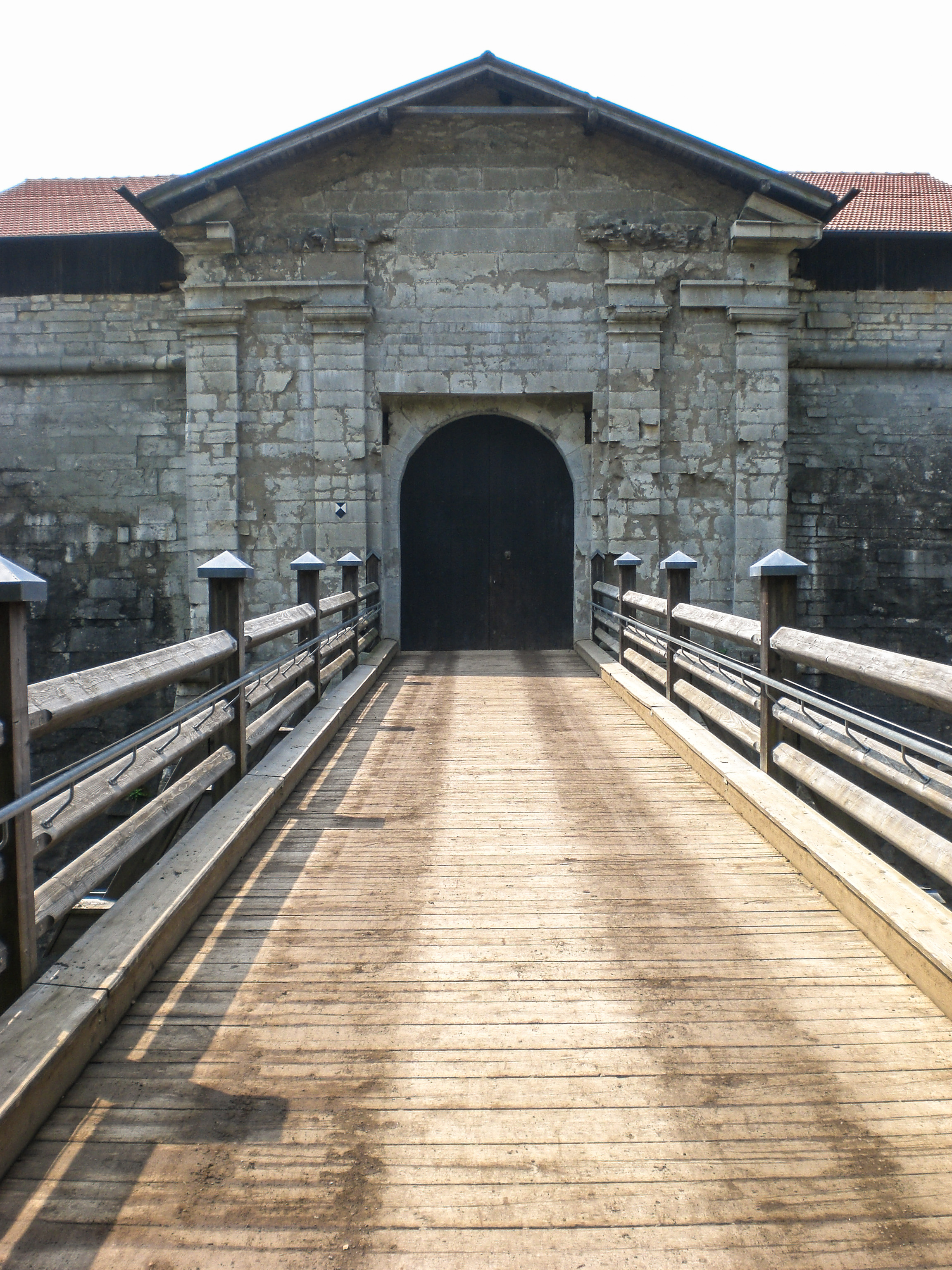 Festung Rothenberg, Schnaittach, Eingangstor